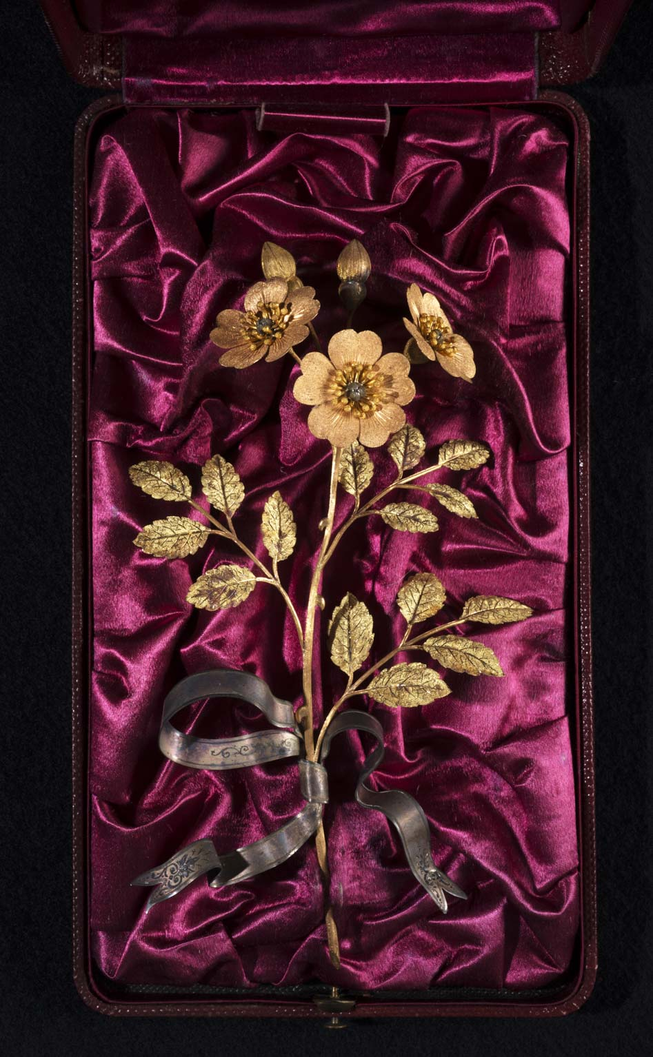 Englantina d'or. Premi Jocs Florals 1888 a Francesc Matheu amb la poesia "Festa"